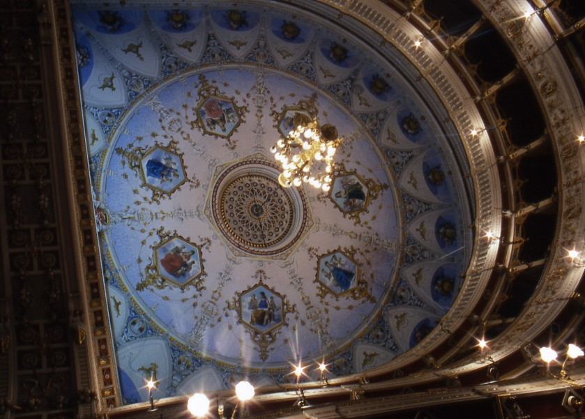 Cagli, Teatro Comunale Parametri [modifica]